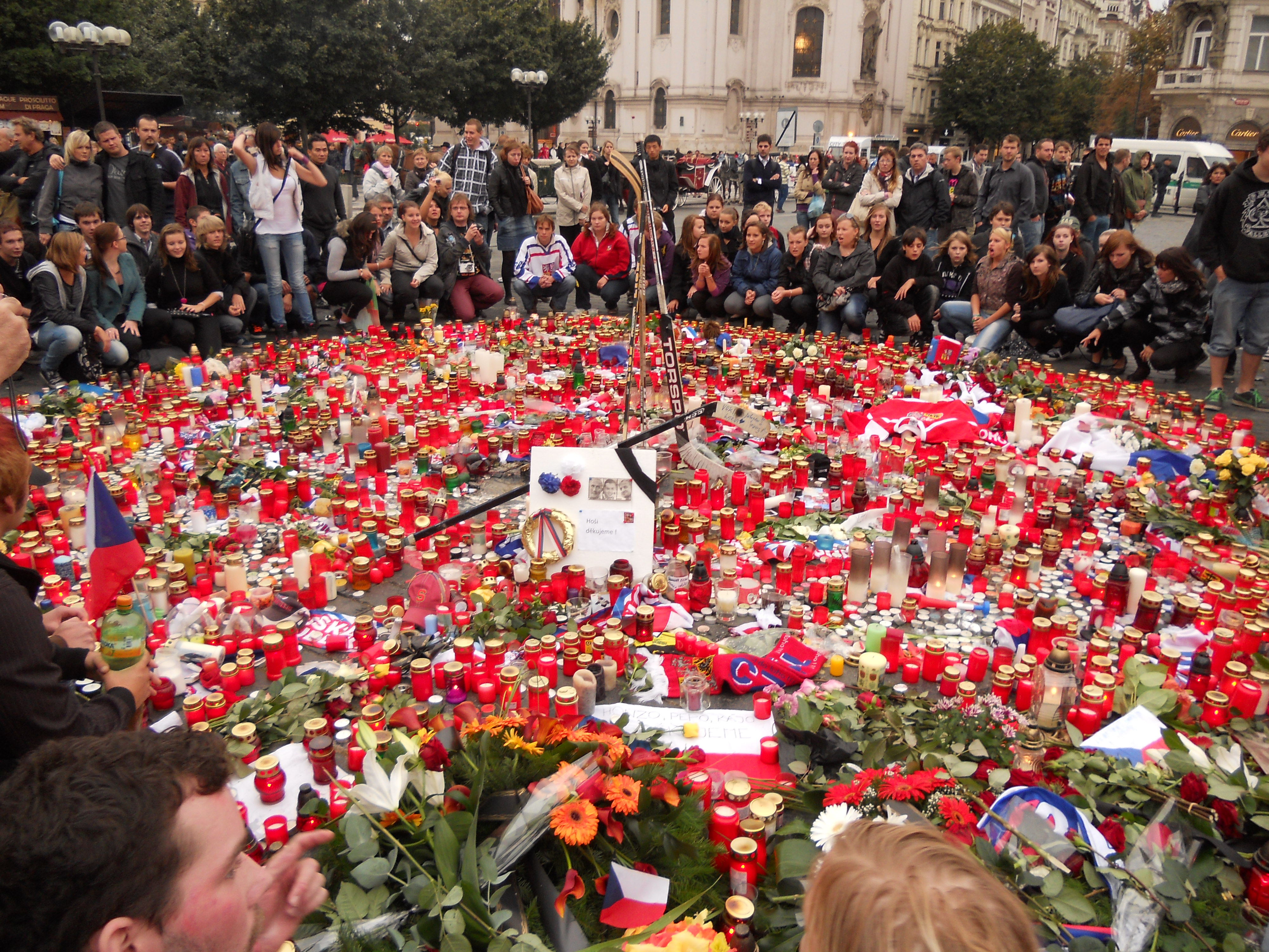 Tryzna na pražském Staroměstském náměstí dne 7. září 2011 za české a slovenské hokejisty (Jana Marka, Karla Rachůnka, Josefa Vašíčka a Pavola Demitru) ze zříceného letadla u Jaroslavle.